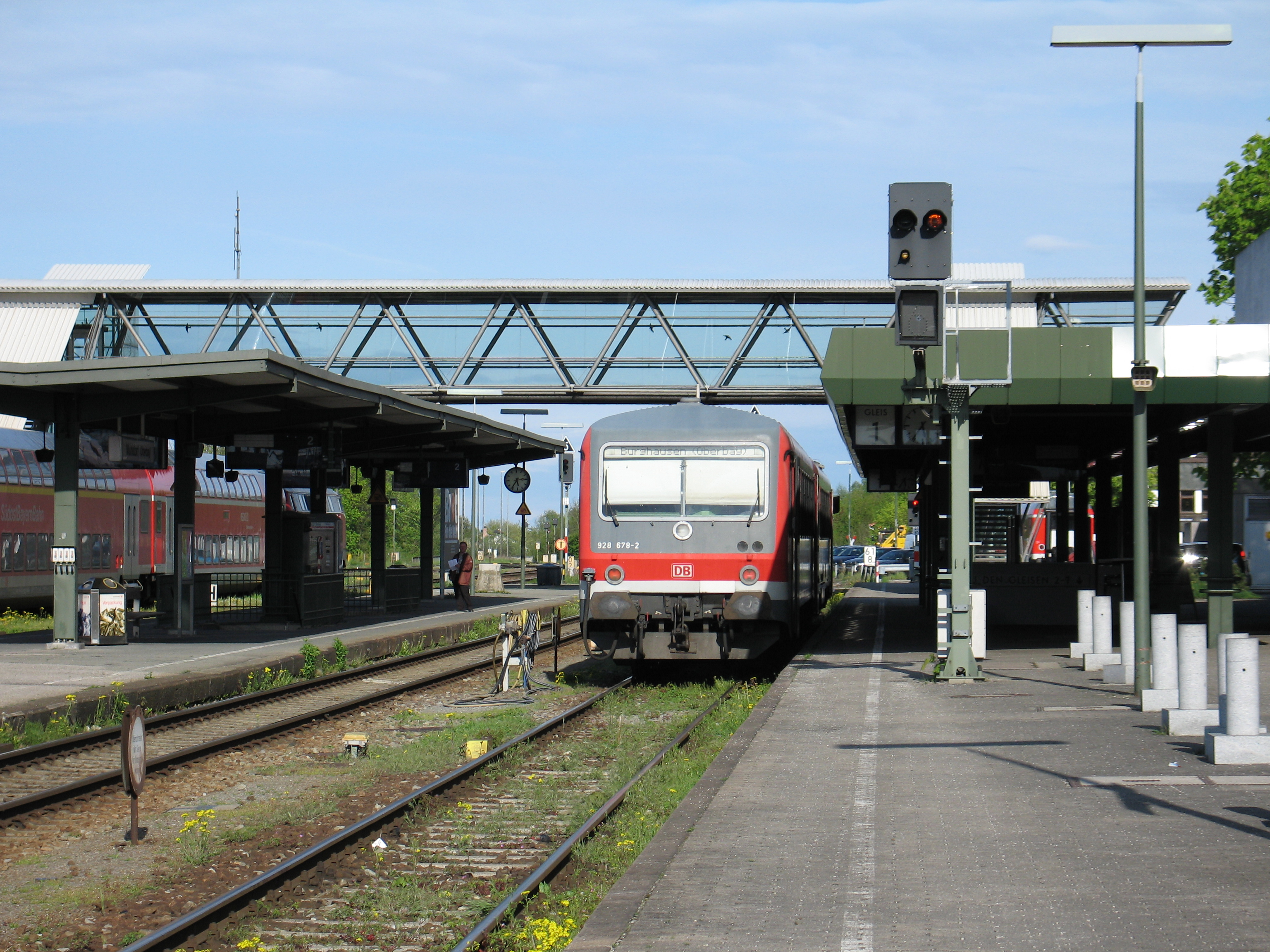 VT / BR 628 am Gleis 1 des Bahnhofes Mühldorf (Oberbay), im Hintergrund die Fußgängerbrücke